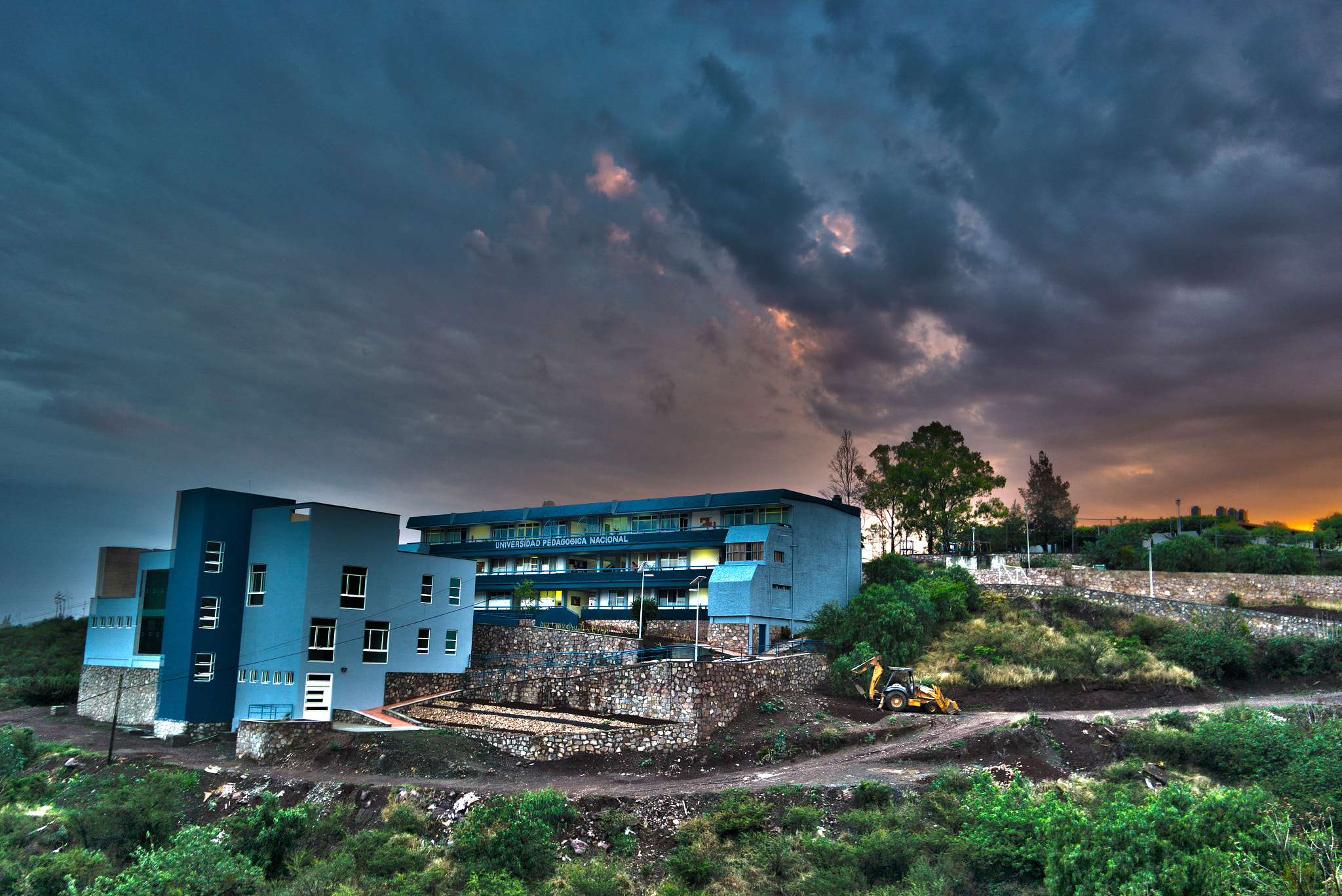 500px provided description: Atardecer en la ciudad de Guanajuato Capital [#vegetation ,#Sky ,#Twilight ,#City ,#Guanajuato]